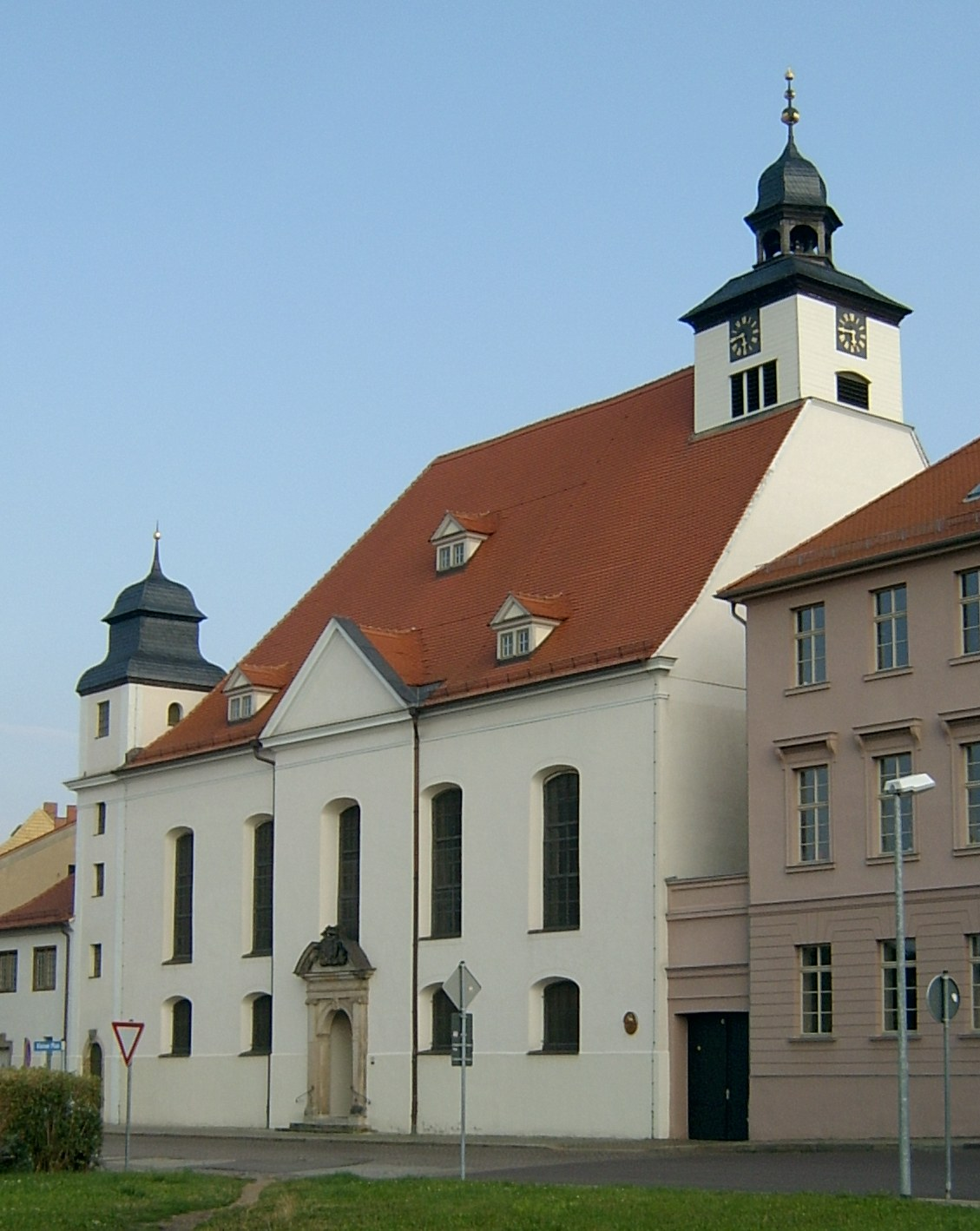 Kirche St. Agnus in Köthen (Anhalt) in der Stiftstraße.